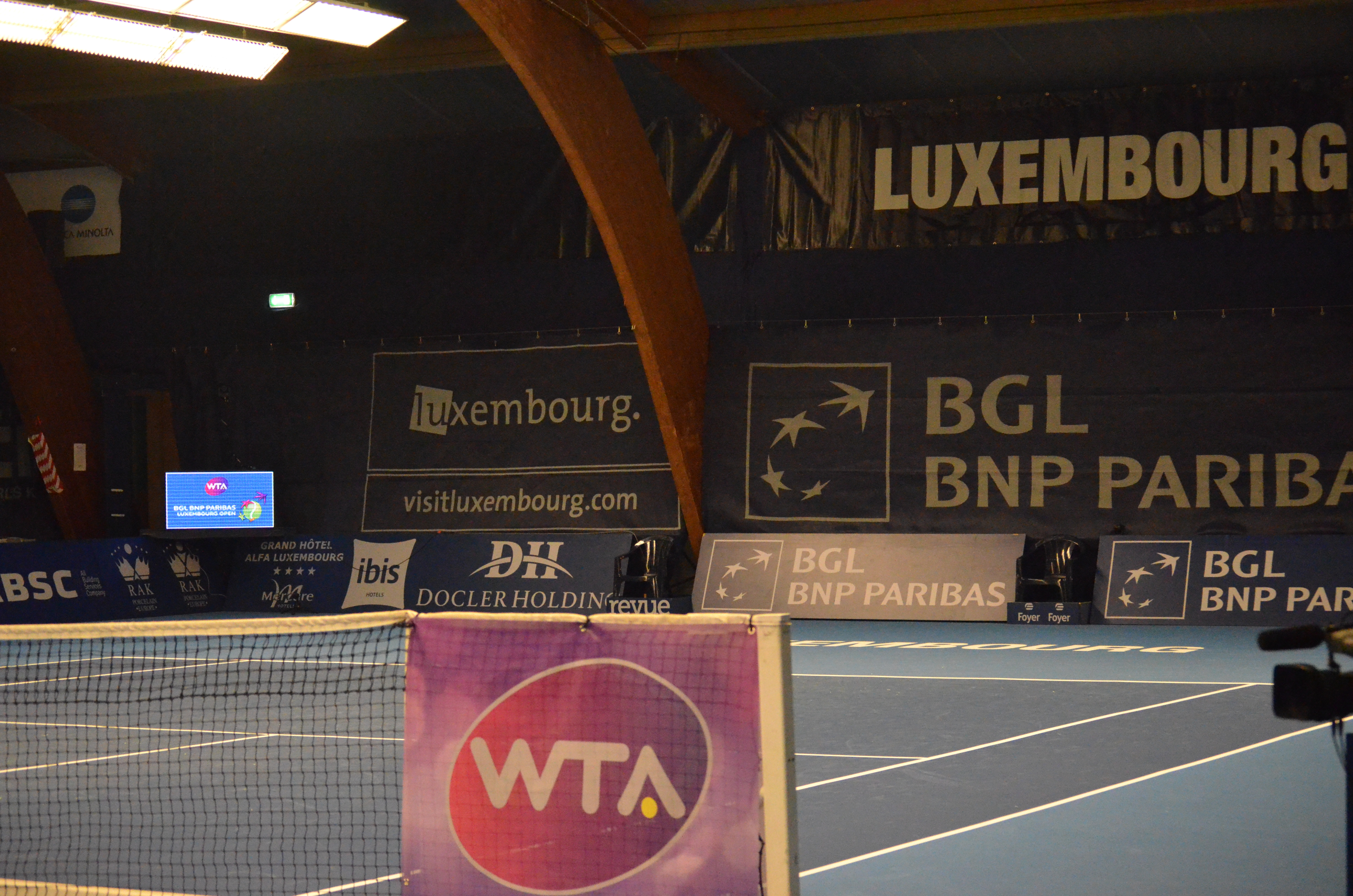 venue for BGL Luxembourg Open